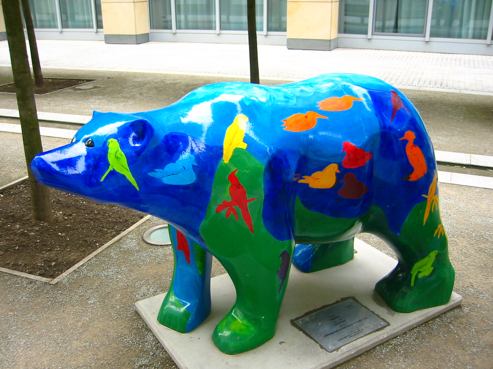 Buddy Bear: Vogelbär Standort/Location: in DomAquarèe (Karl-Liebknecht-Str. 5), Berlin-Mitte